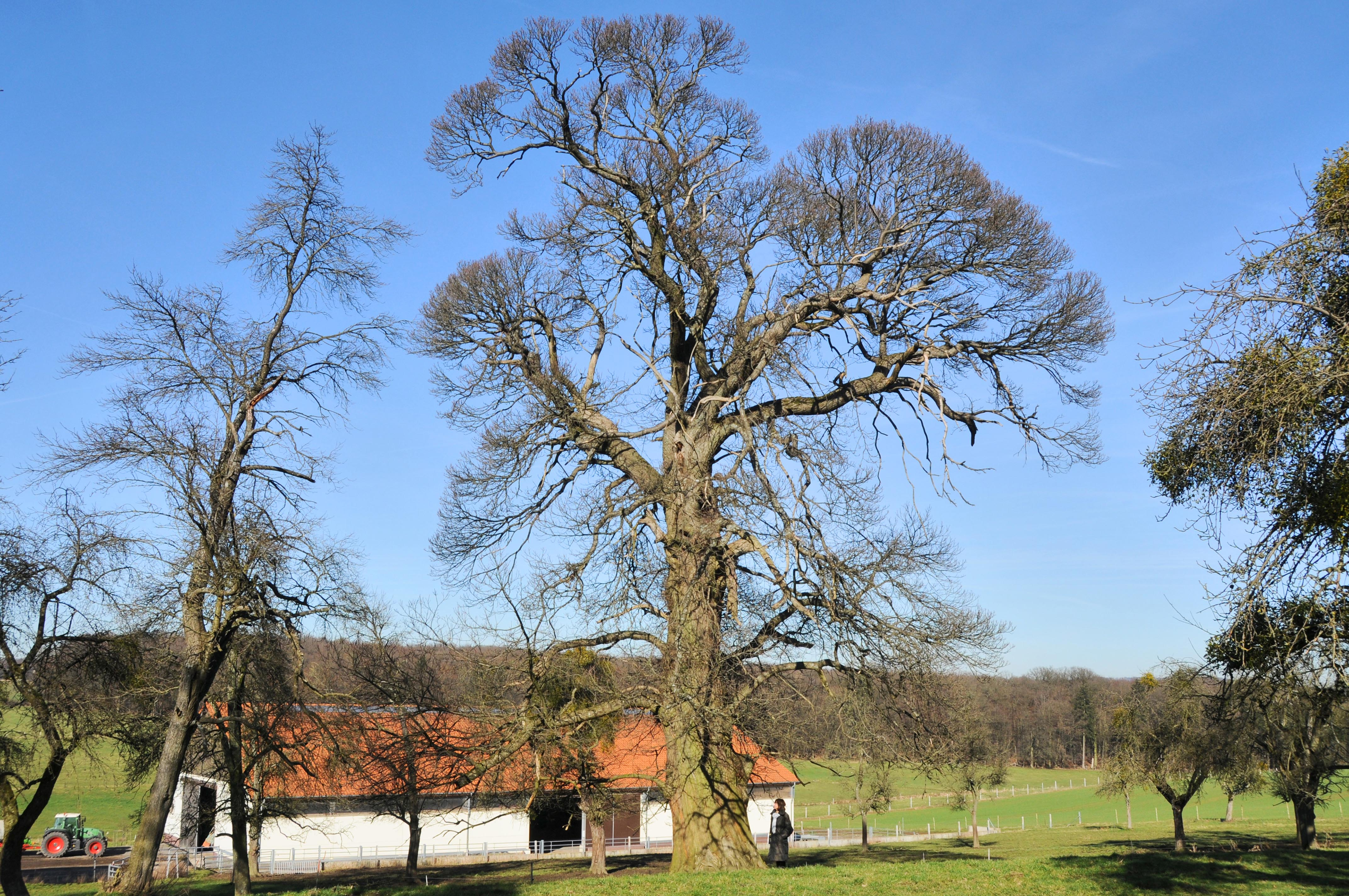 Le châtaignier européen remarquable à Pleitrange (Contern, Luxembourg)